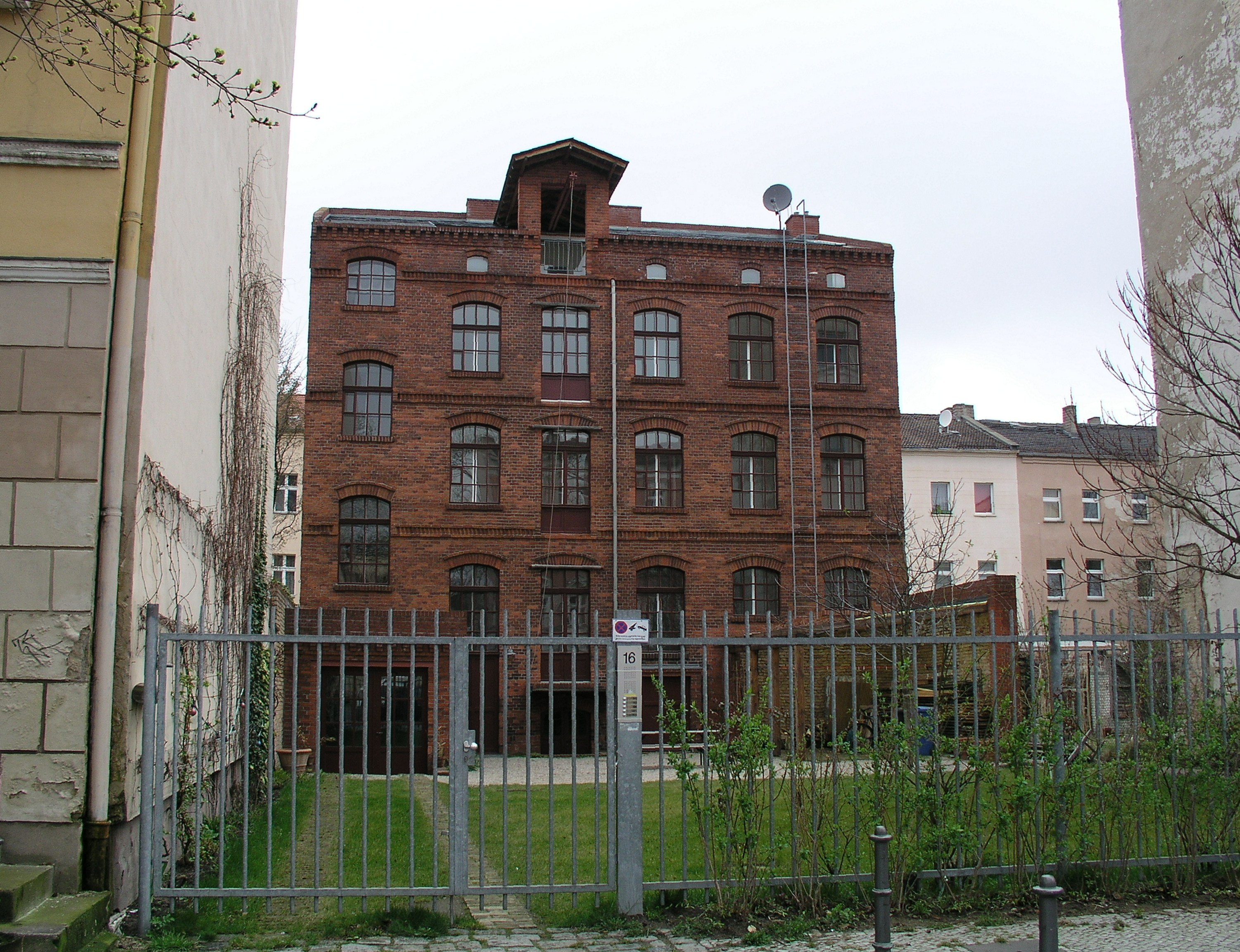 alte Fabrik (2)